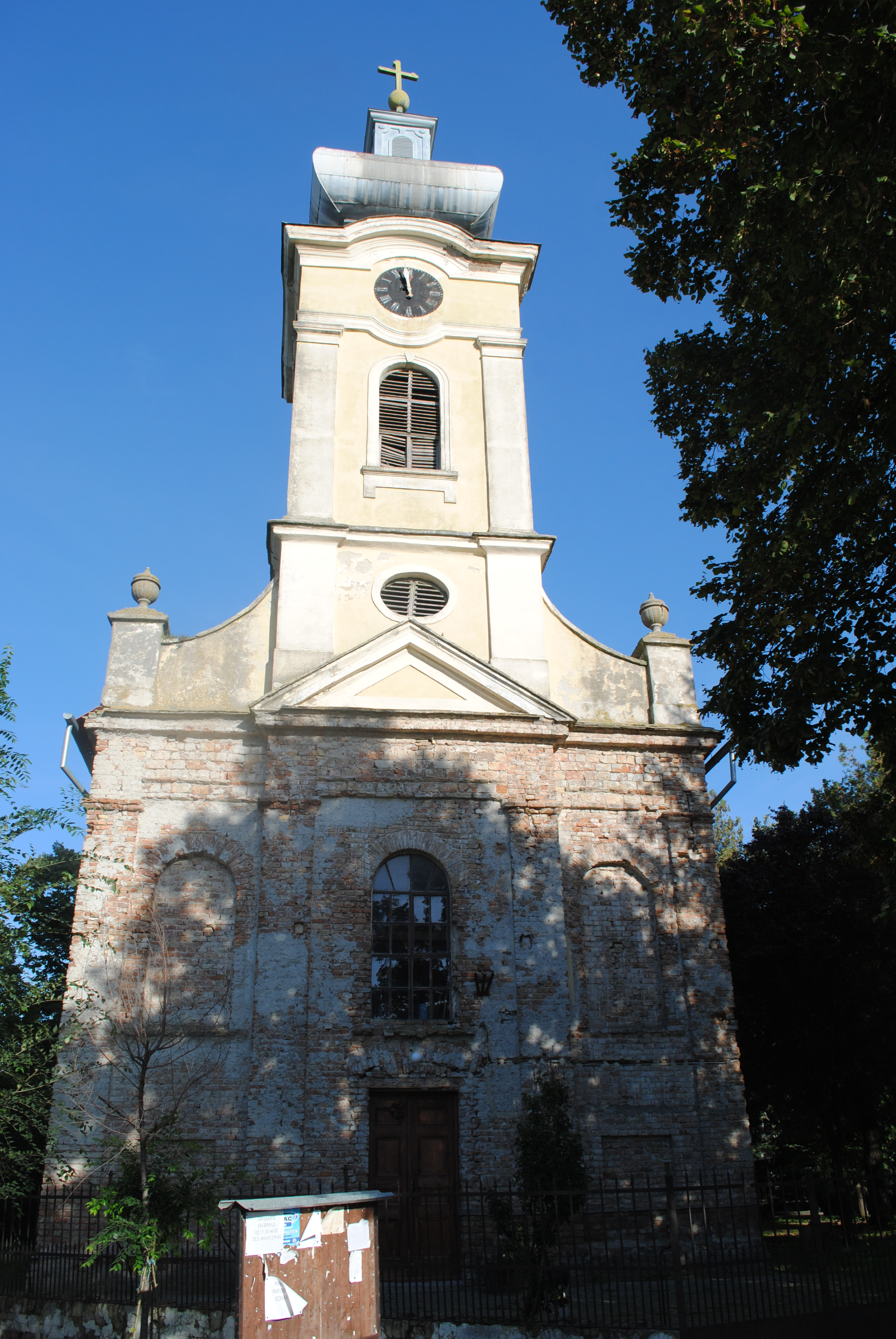 Srpski (latinica): Crkva svetih arhangela Mihaila i Gavrila u Idjošu